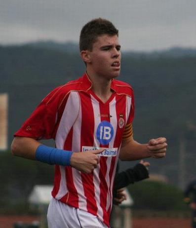 Gerard Gumbau